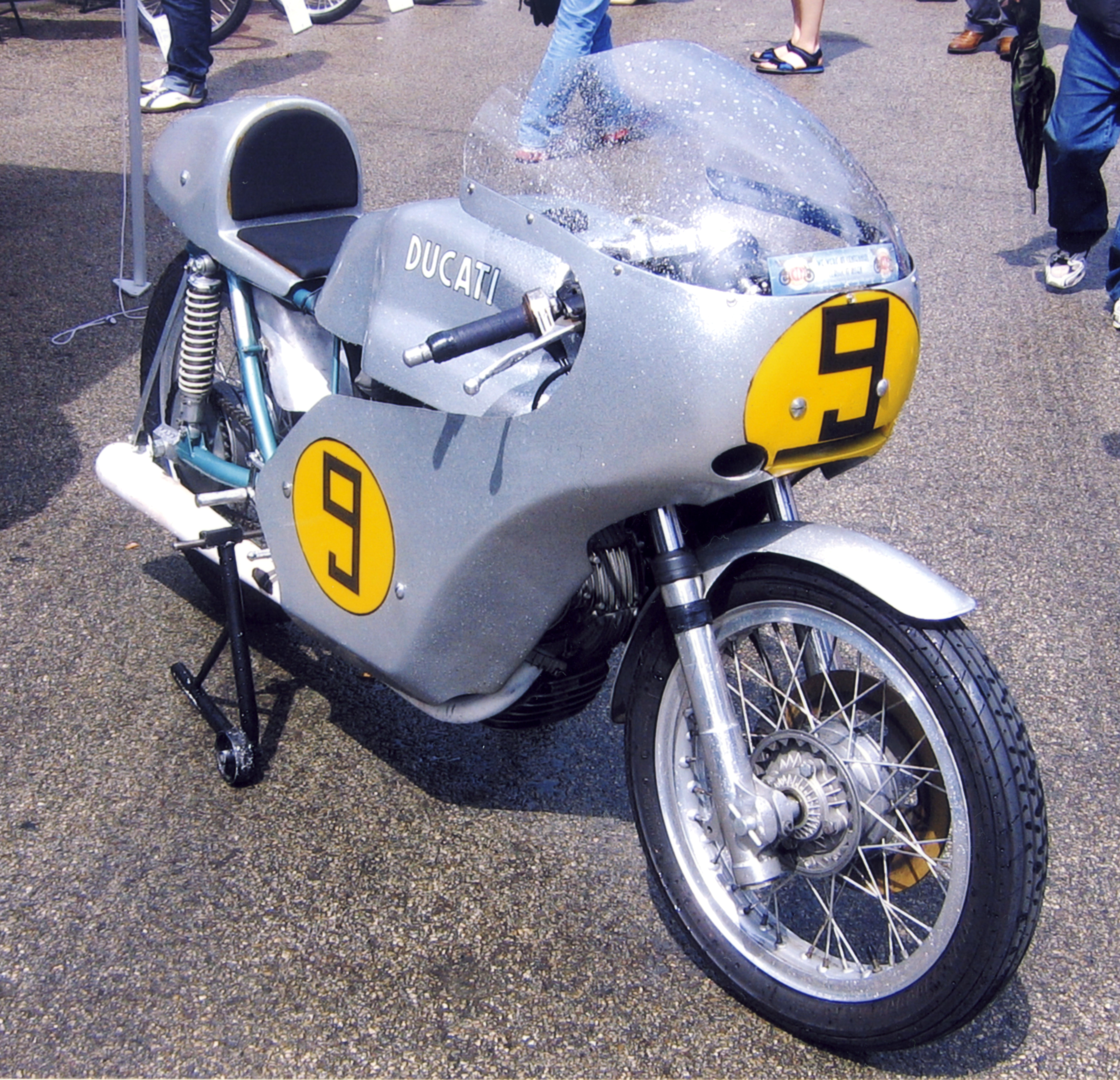 Ducati 500 GP prototipo al "Pasolini Day" di Rimini, maggio 2007.